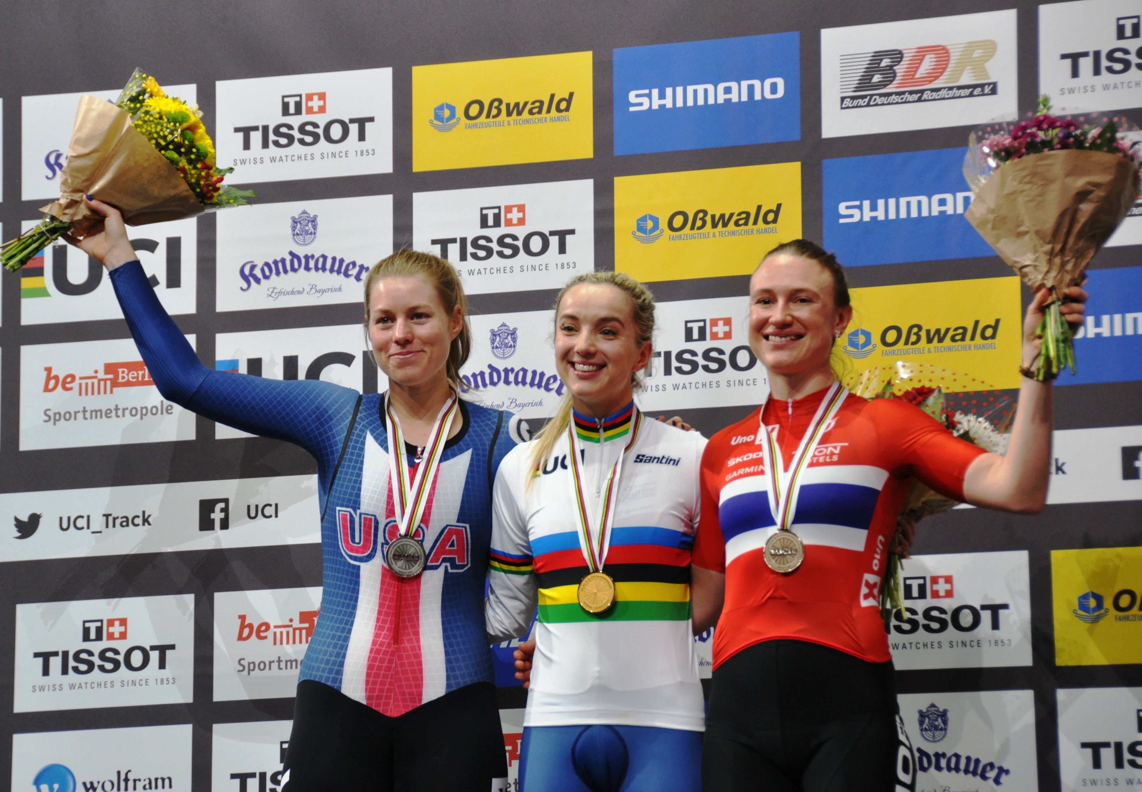 Podium Punktefahren (v.l.n.r.): Jennifer Valente, Elinor Barker, Anita Stenberg